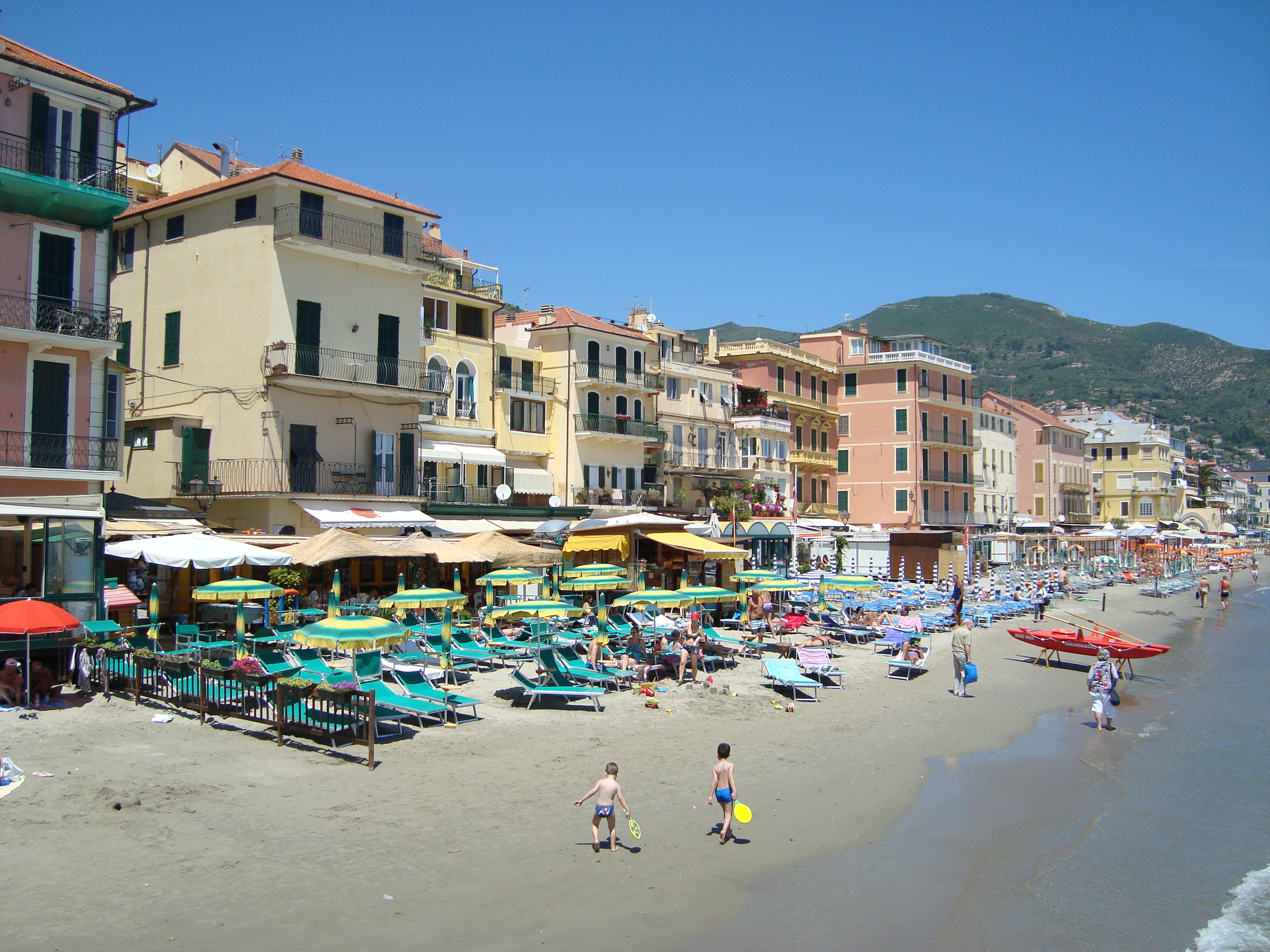 Alassio